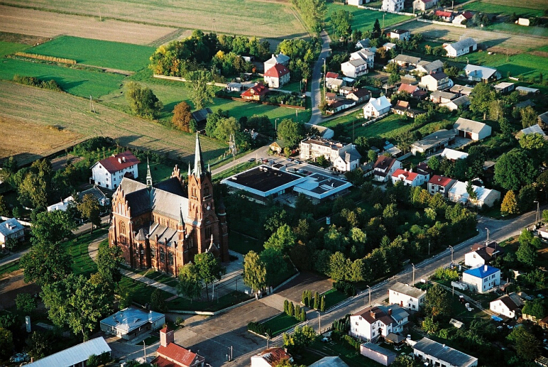 Zdjecie lotnicze - Latowicz - widok centrum miejscowości